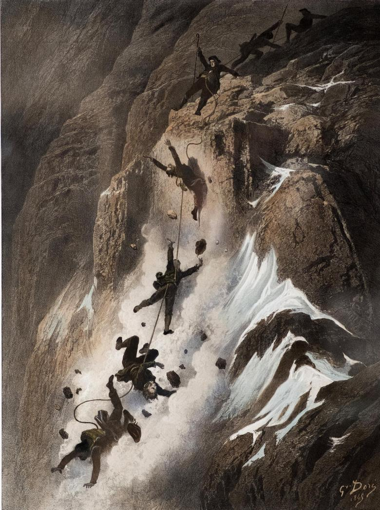 Absturz am Matterhornbeim Abstieg nach der Erstbesteigung